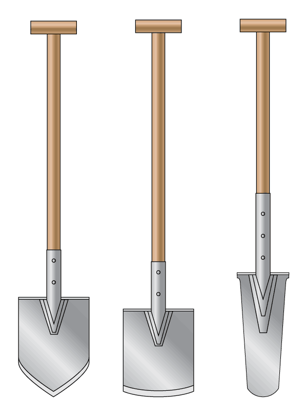 Shovel types